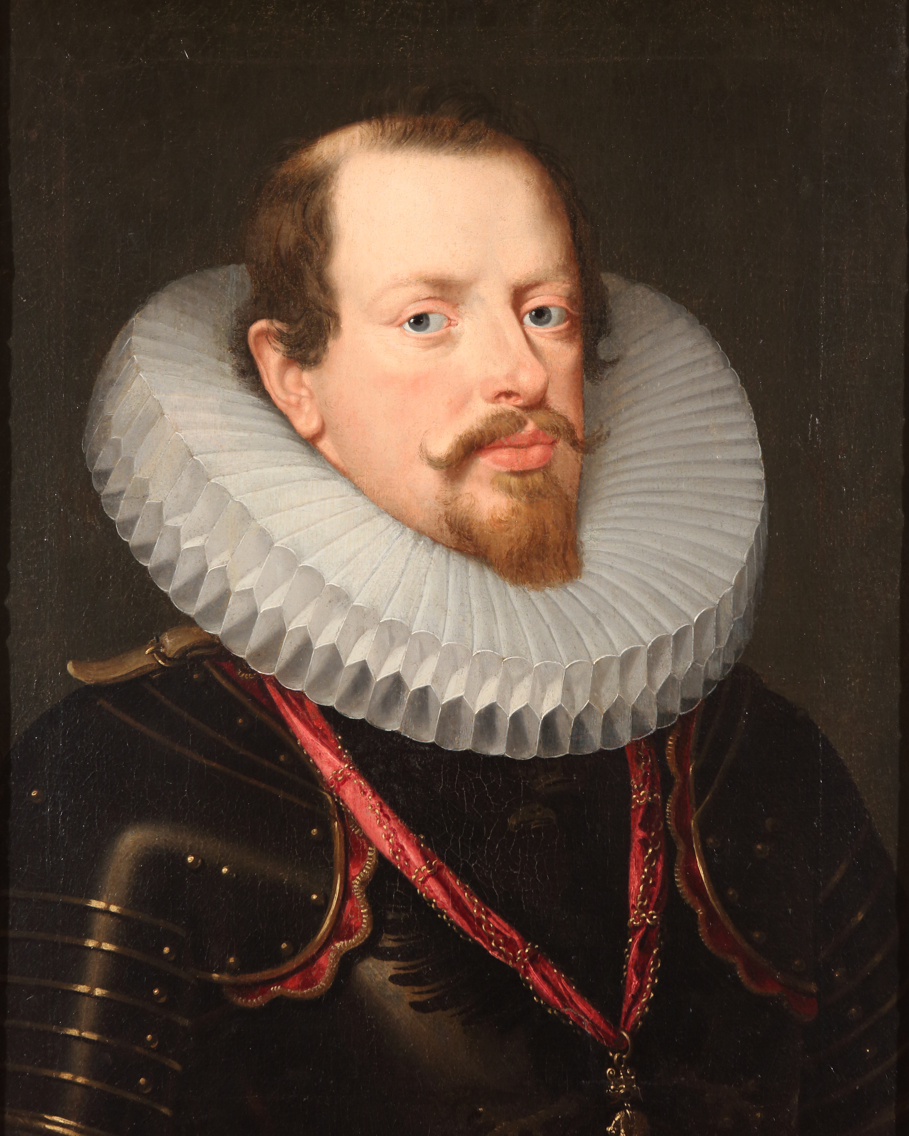 Ritratto di Vincenzo I